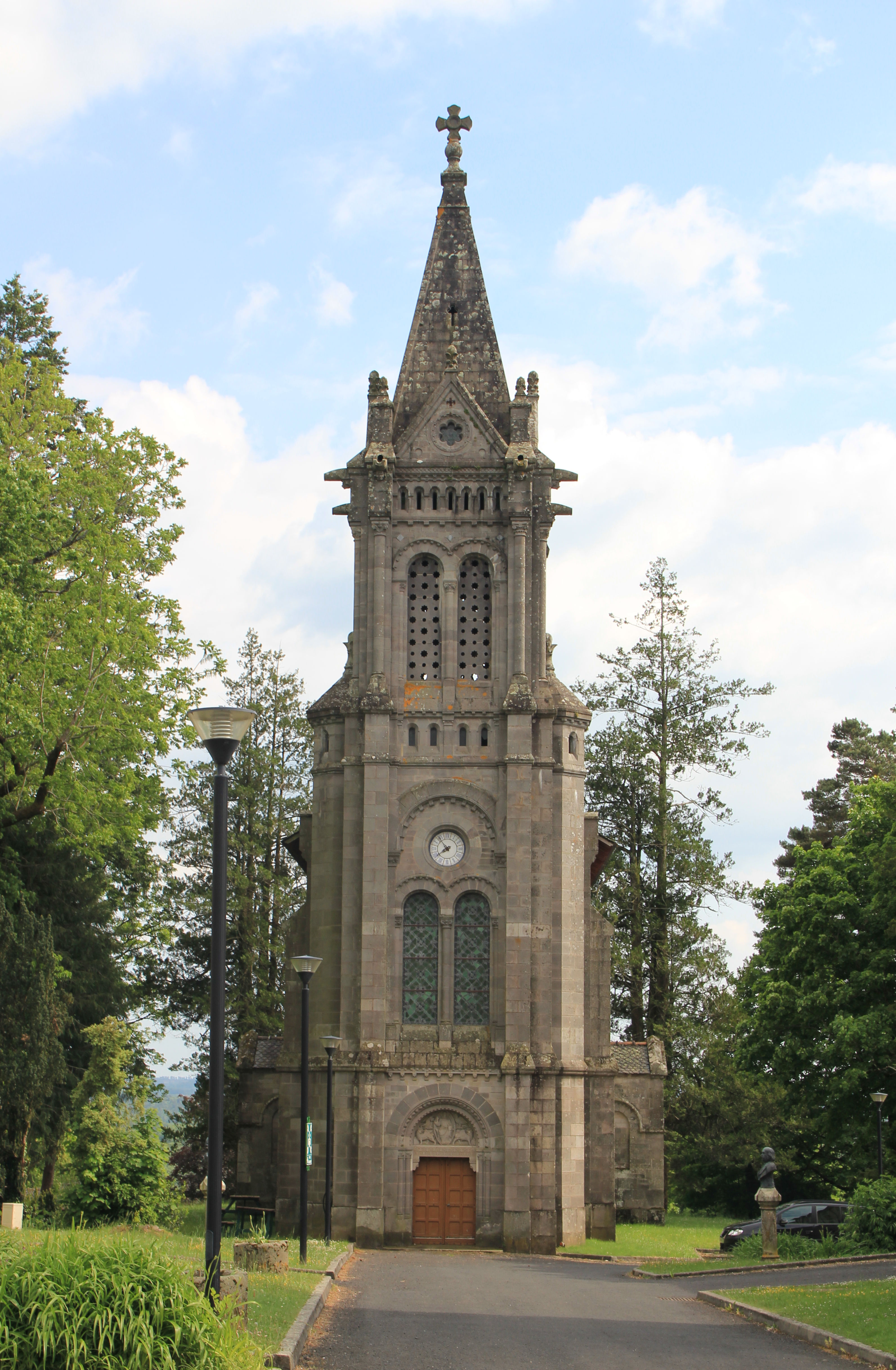 Chapelle d'Albart